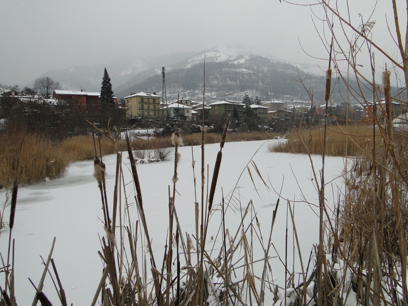 Area umida nell'Oasi Saletti: lago di fitodepurazione. PLIS NaturalSerio. Nembro (Bergamo)